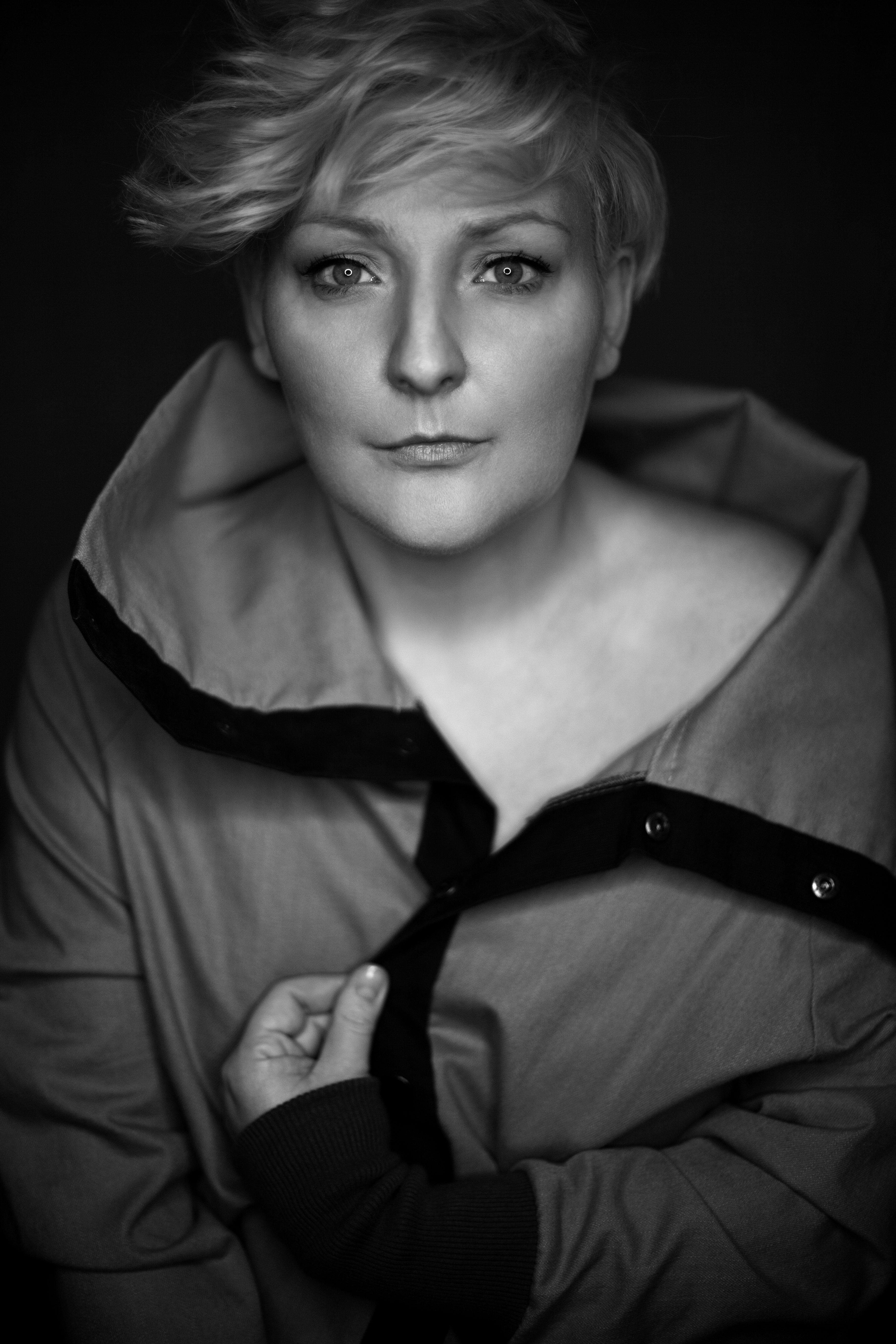 fot. Gosia Frączek